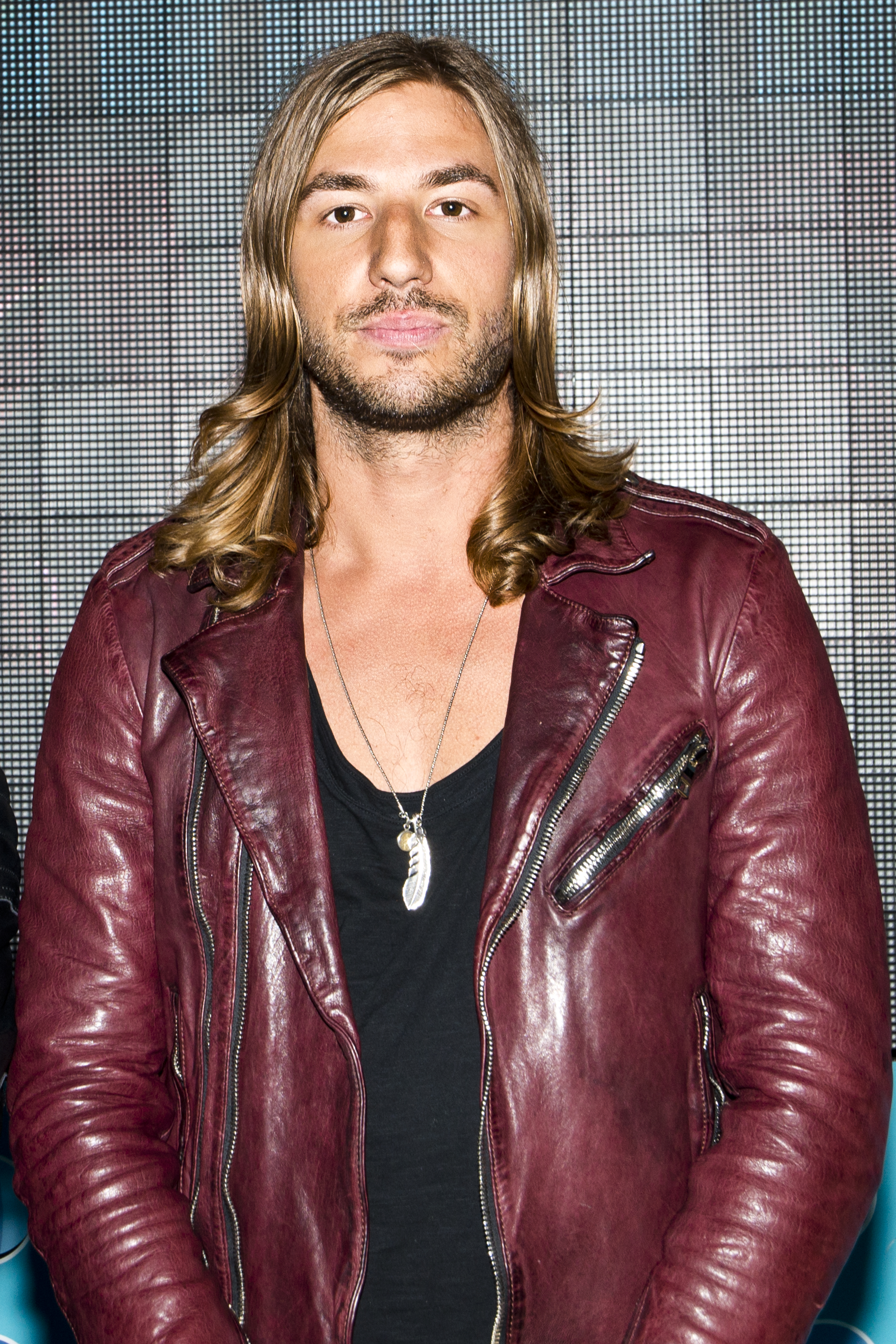 John Martin på Sommarkrysset 2014